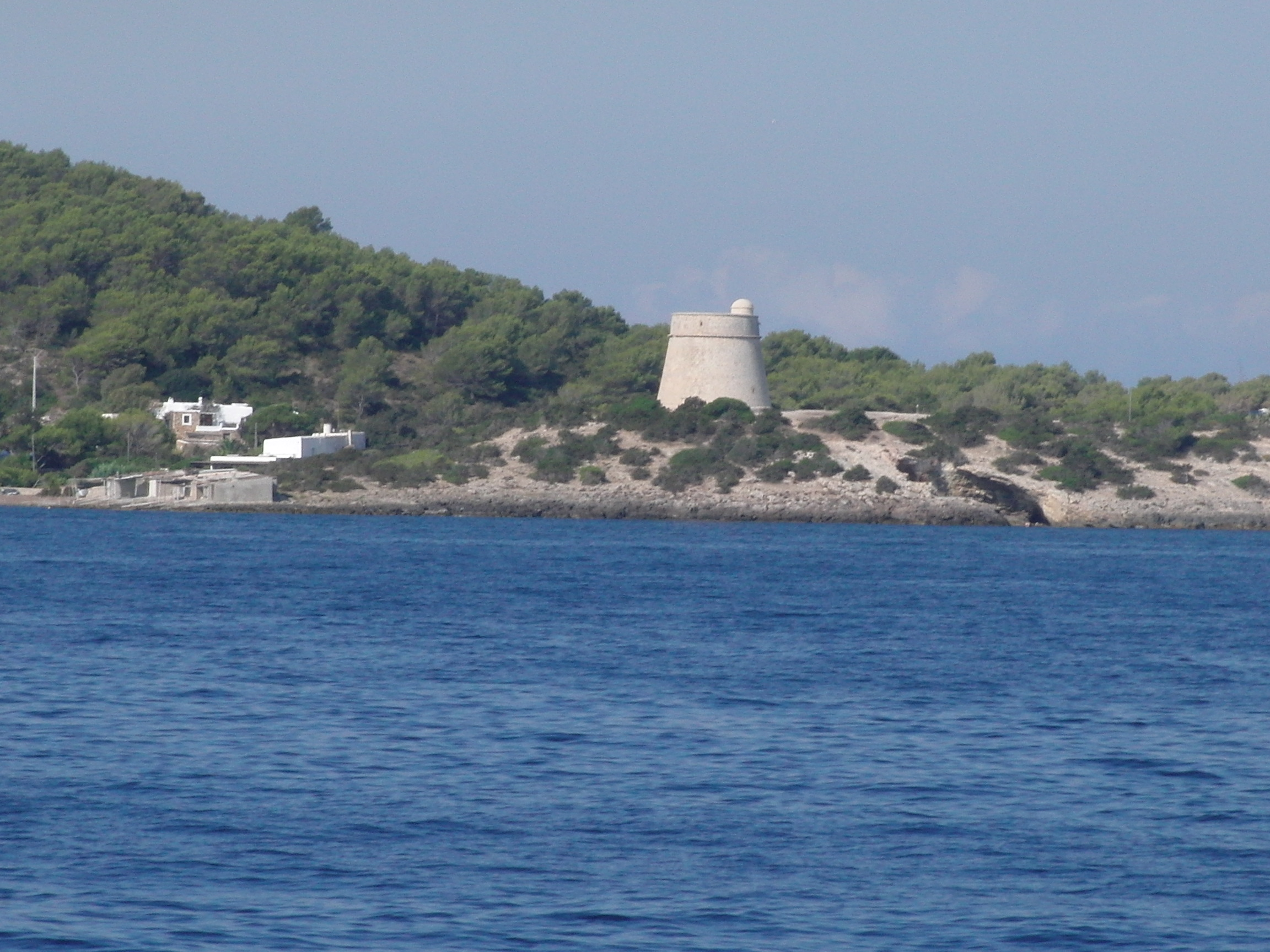 Turm zur Verteidigung der Insel Ibiza